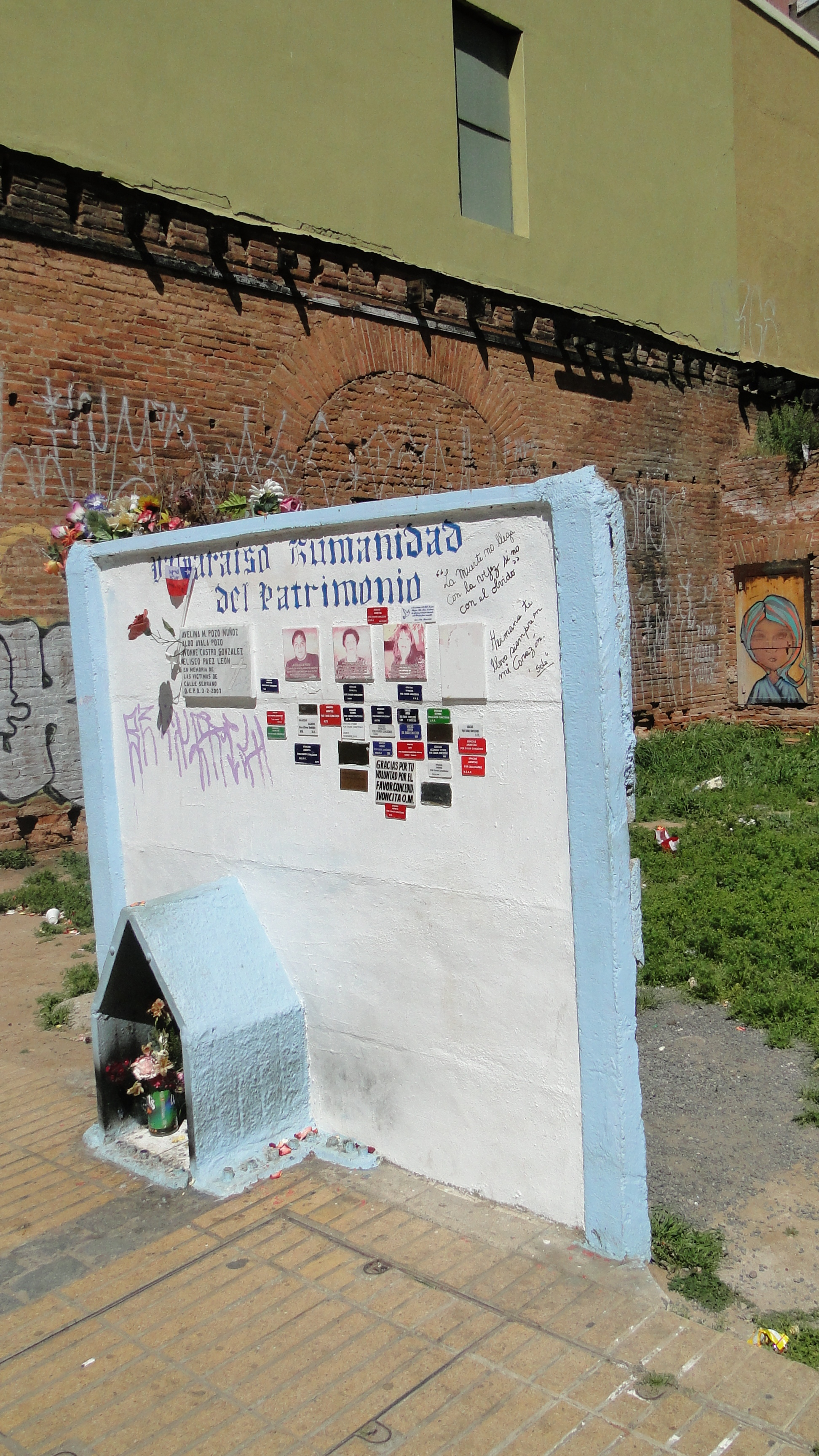 Sector Plaza Echaurren y calle Serrano This is a photo of a national monument in Chile: 472